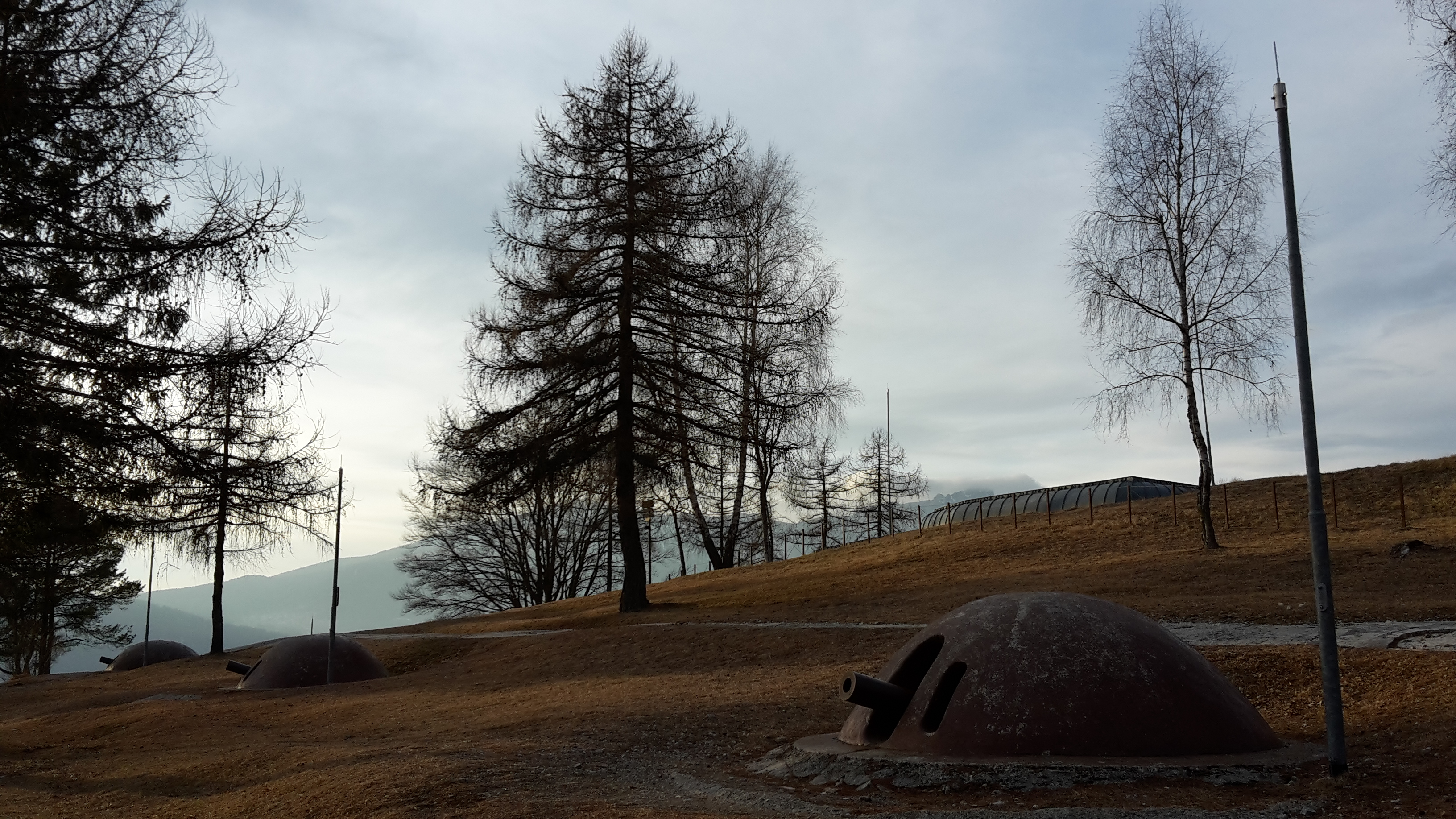 Forte Belvedere-Gschwendt